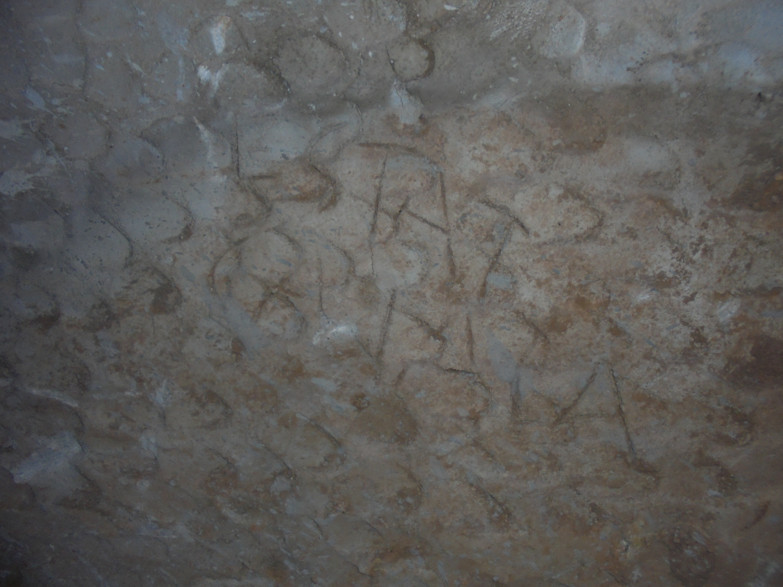 Grafiti d'Estat Català fet mentre el ciment encara era tendre al 1938.